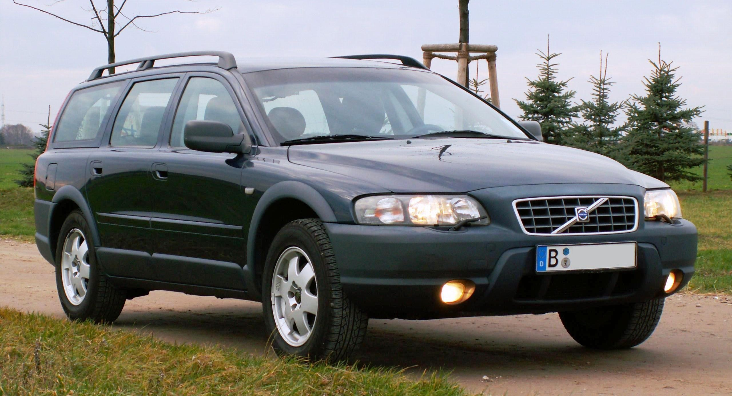 Ein Volvo XC70 bzw. V70 XC - Modelljahr 2001